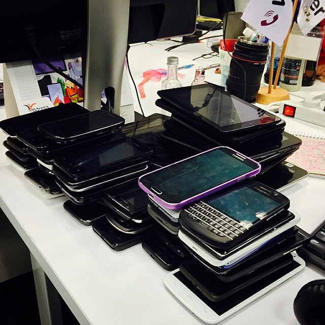 Смартфоны и планшеты